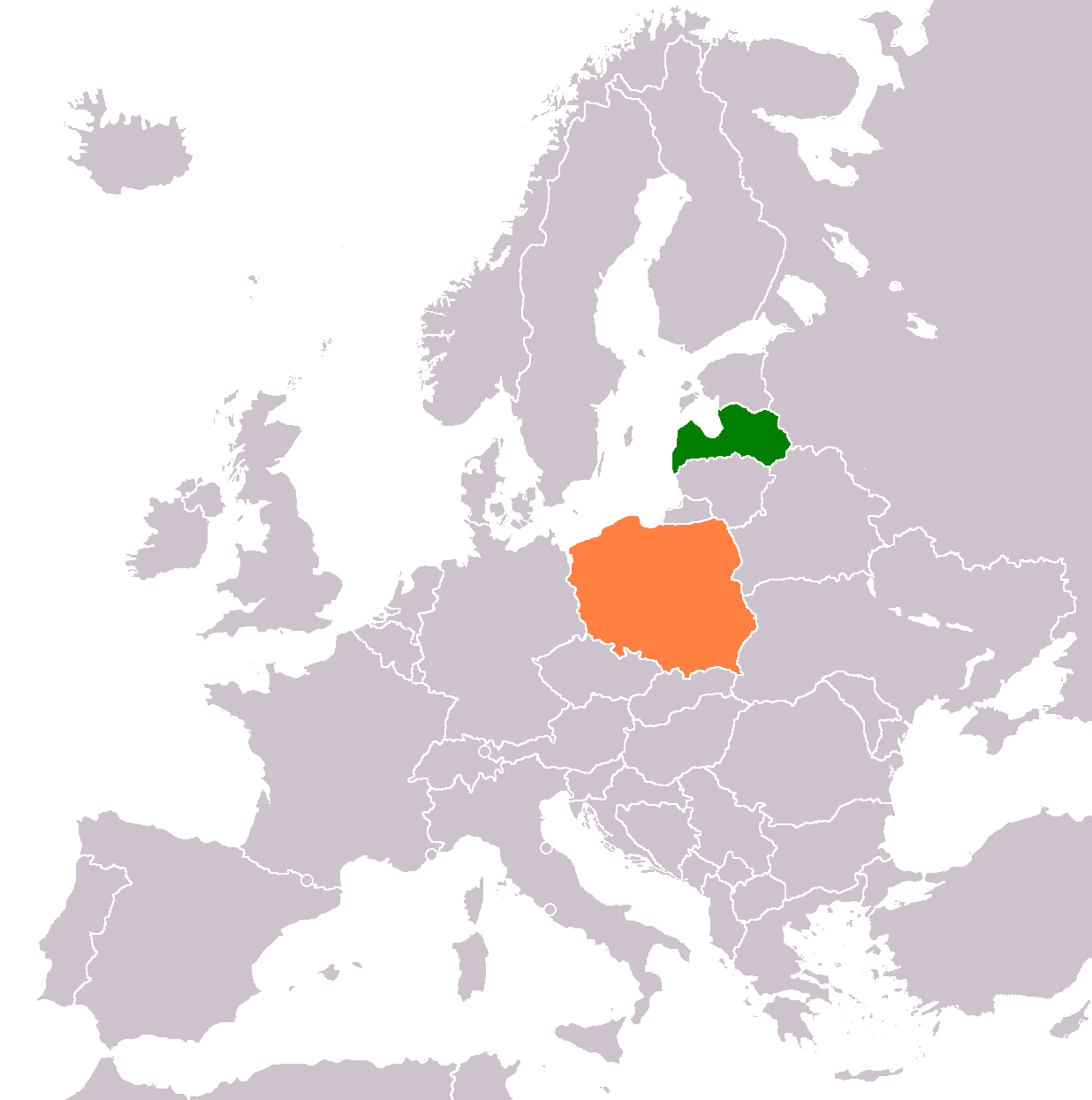 Latvia-Poland locator map.